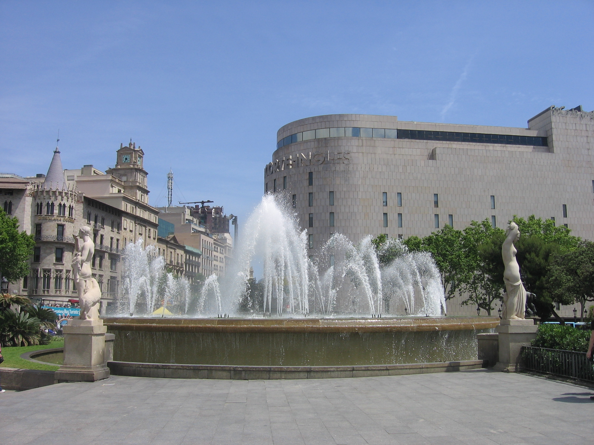 Fuente de la Plaza de Cataluña (Barcelona).